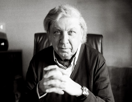 CRA en su estudio